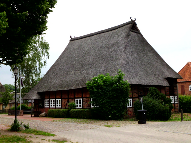 Die Dorpschün